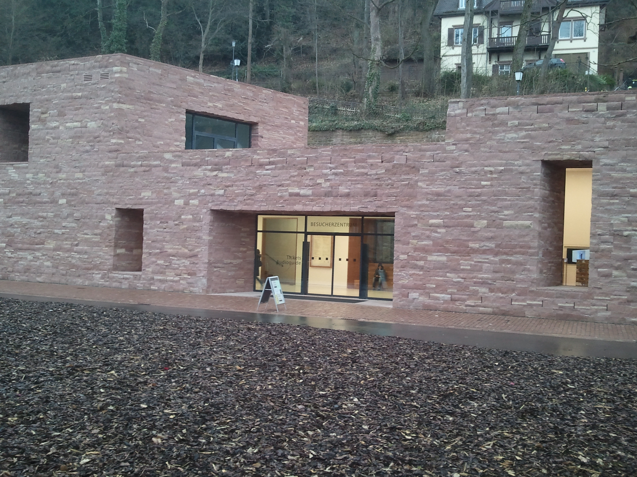 Bild des Neuen Besucherzentrums am Heidelberger Schloss